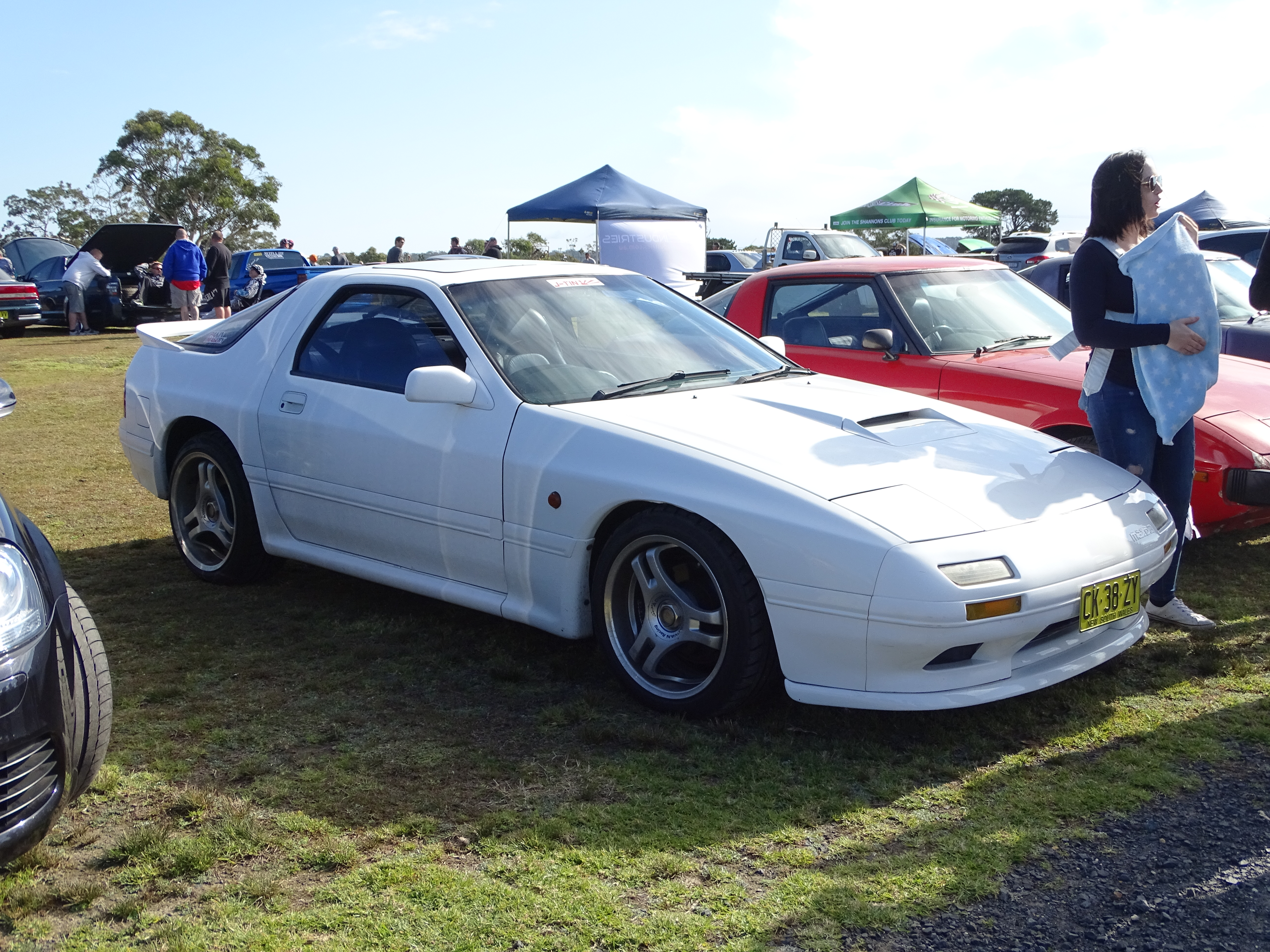 Mazda RX7 Turbo